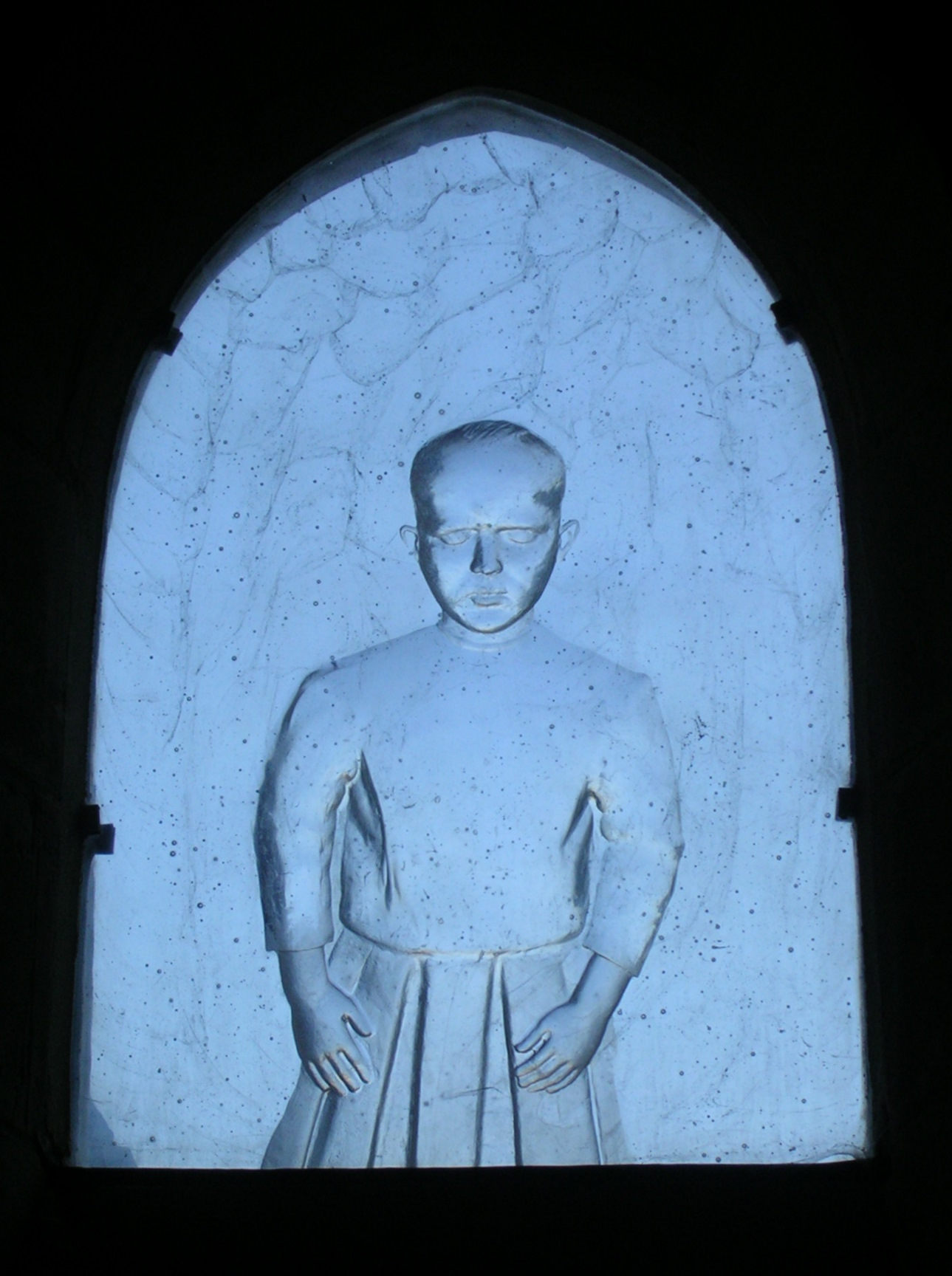 Abbaye de Saint-Gildas-des-Bois, vitrail conçu par Pascal Convert